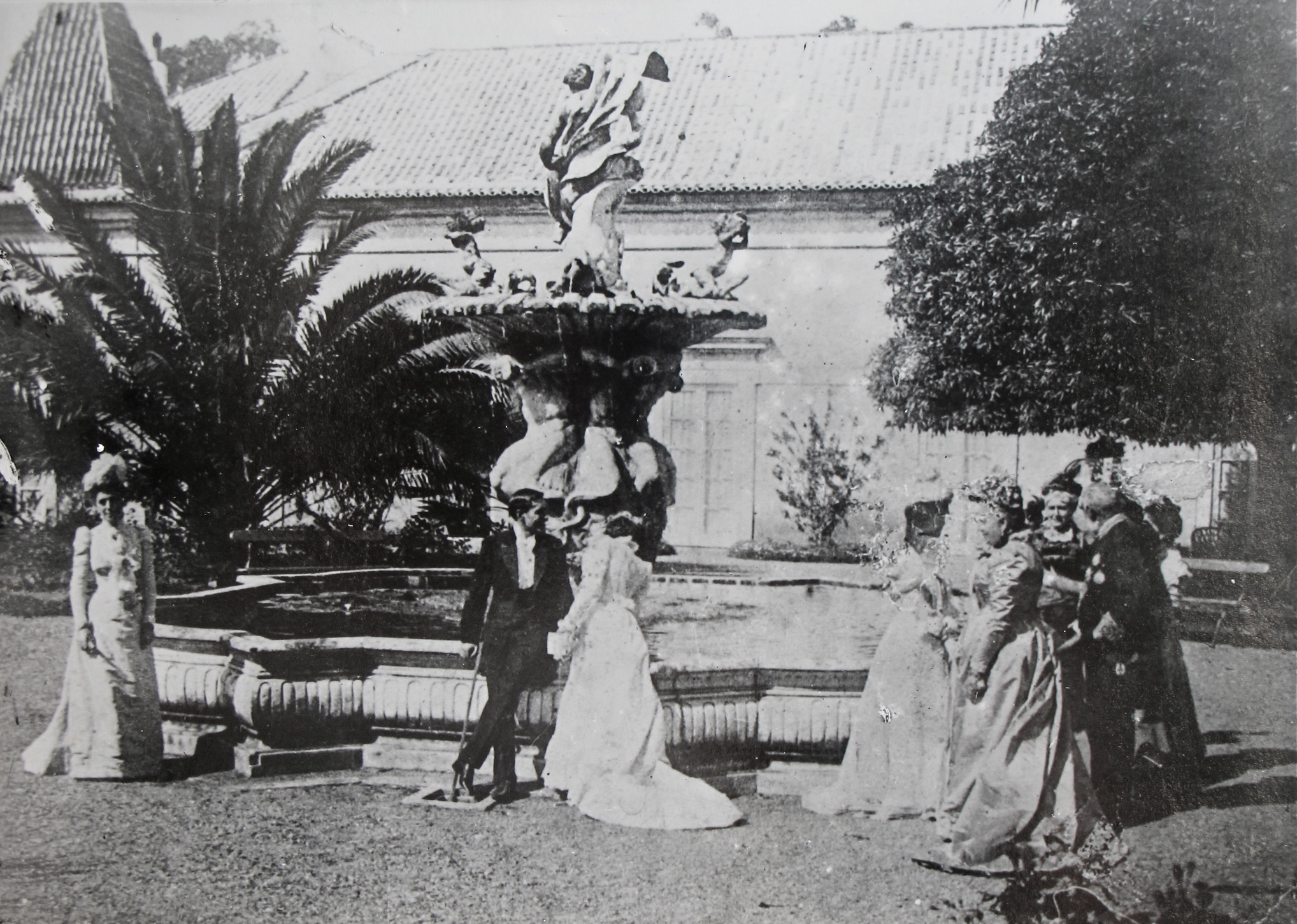 Boda de Ramón de Olazábal y Álvarez de Eulate y Maria Luísa de Mendóça Rolim de Moura Barreto. A la derecha, se puede ver a Tirso de Olazábal, a su mujer, Ramona Álvarez de Eulate, y a Isabel Széchényi, marquesa de la Romana. Fotografía tomada en los jardines del Palacio de Palhavan, en Lisboa, propiedad del padre de la novia, Augusto Pedro de Mendóça Rolim de Moura Barreto, conde de Azambuja.